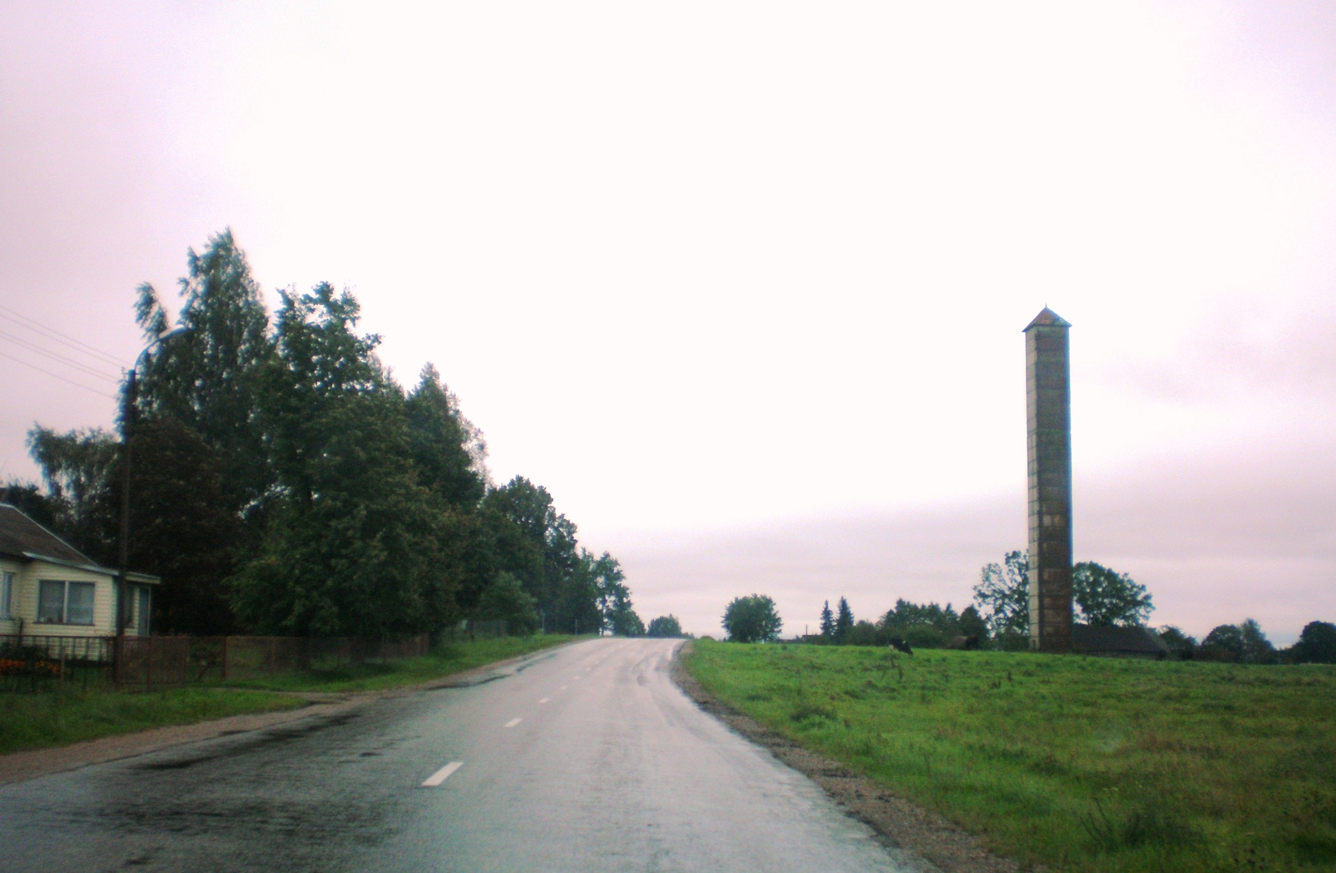 Šventragis, Marijampolės sav.